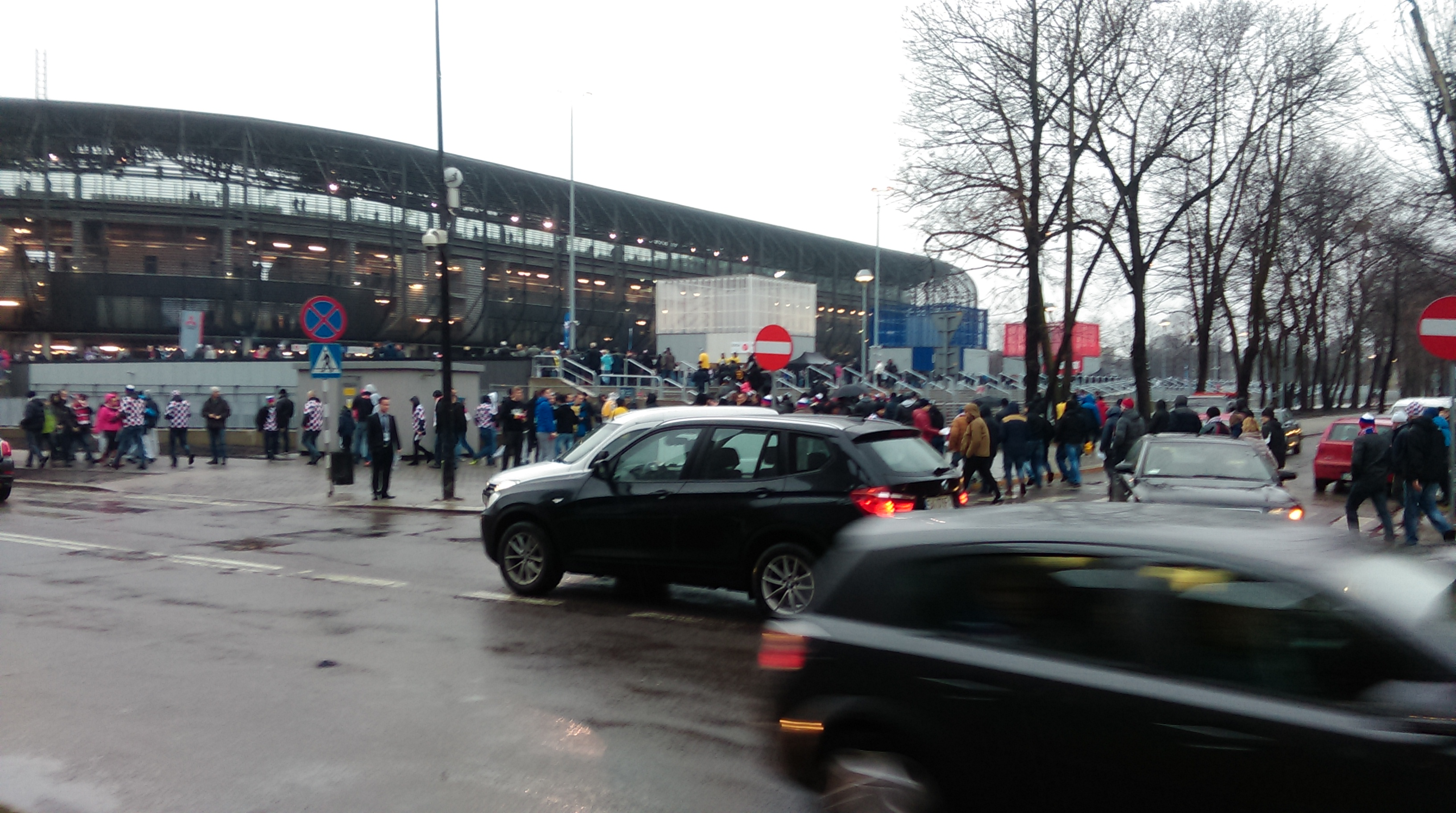 Górnik Zabrze Stadium